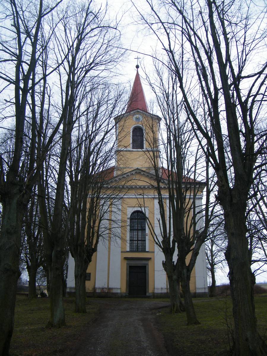 Kostel svatého Vavřince v Království u Šluknova